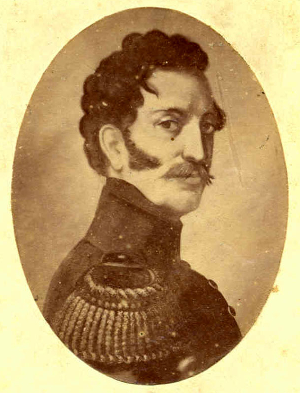 Retrato de José María Cabal, militar y prócer de la independencia de Colombia